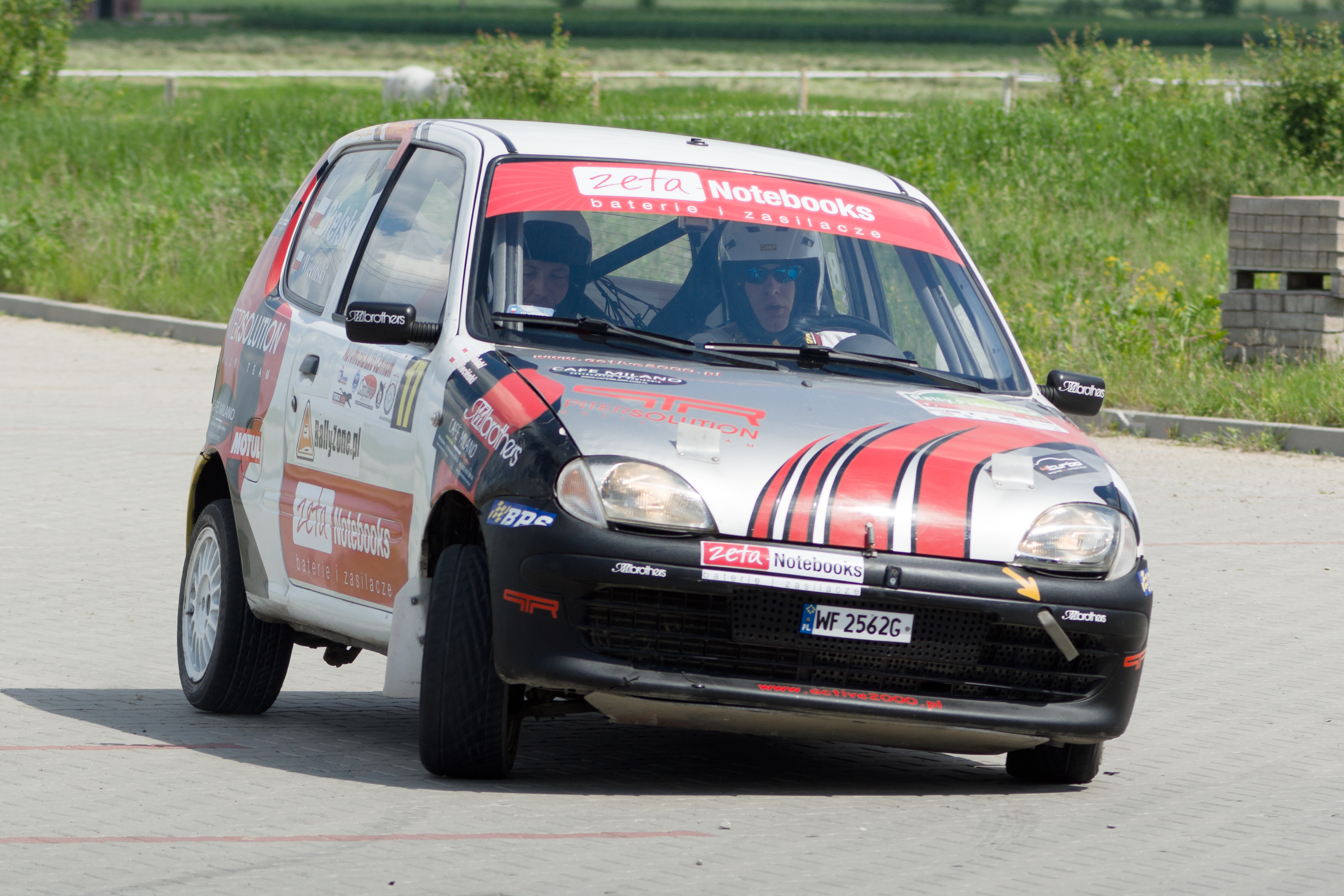 Wyścig VII Rally Piaseczno 2012, OS Lesznowola, Fiat Seicento, nr startowy 17, kierowca Tomasz Bielski, pilot Piotr Wieciński.